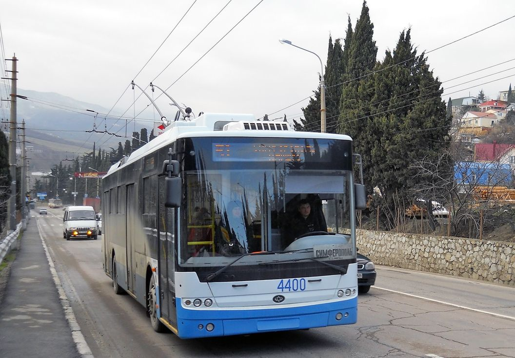 Троллейбус "Богдан Т701.15" на маршруте 51 в Алуште